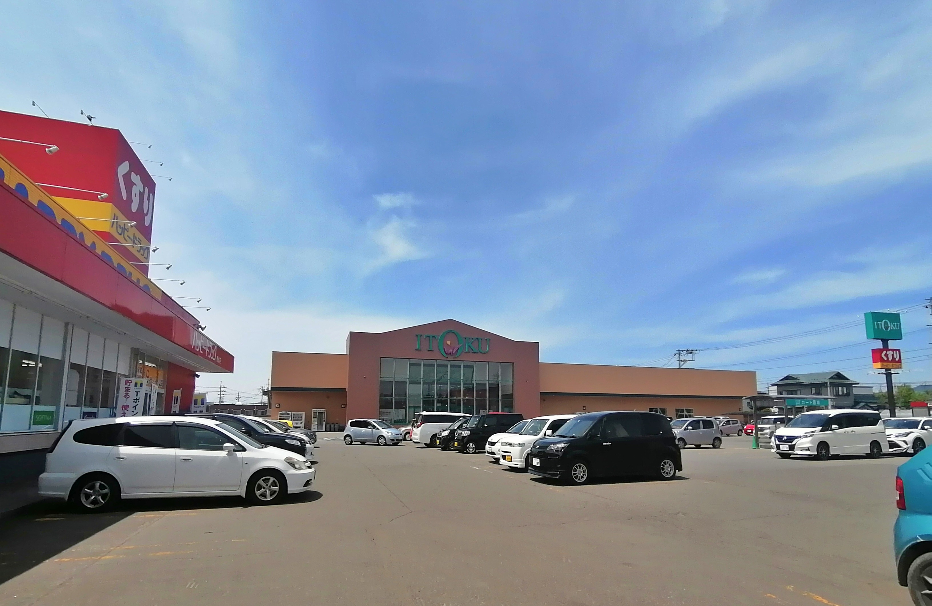 いとく鷹巣南店：北秋田市米代町